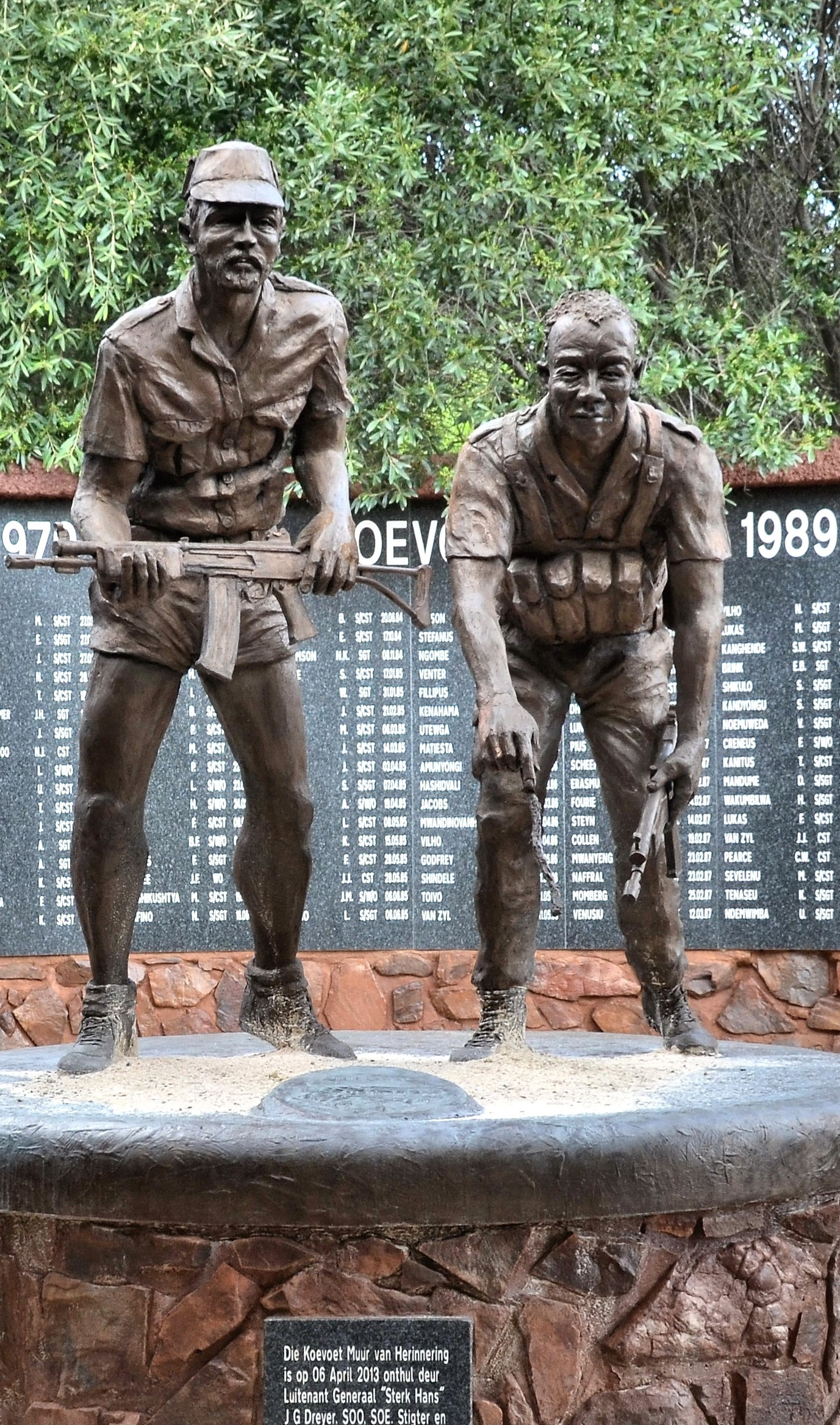 KOEVOETの銅像